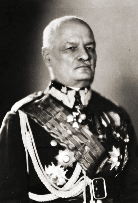 Gen. dyw. Jan Romer - inspektor armii (1926-1932).